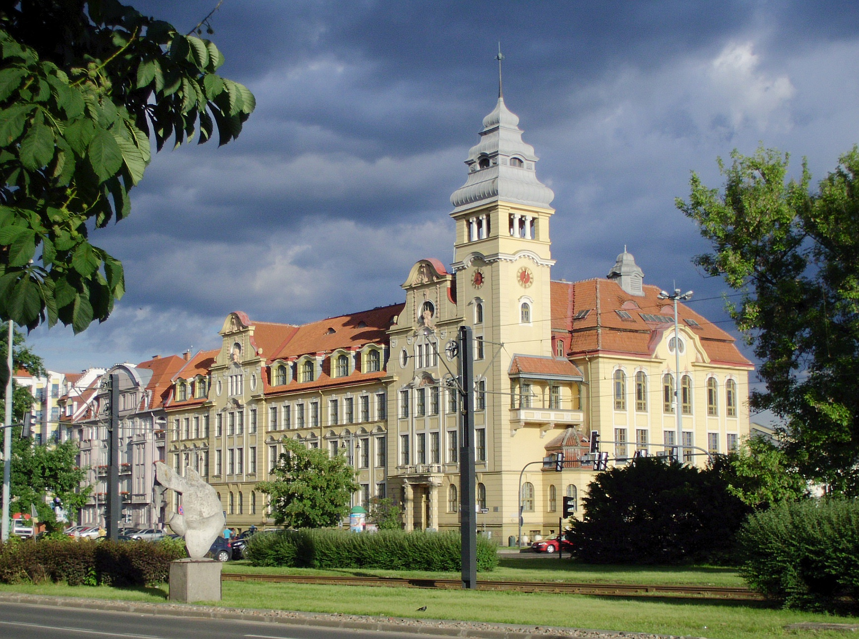 Bydgoszcz, szkoła rzemiosł i przemysłu artystycznego, ob. Zespół Szkół Mechanicznych, 1910-1911